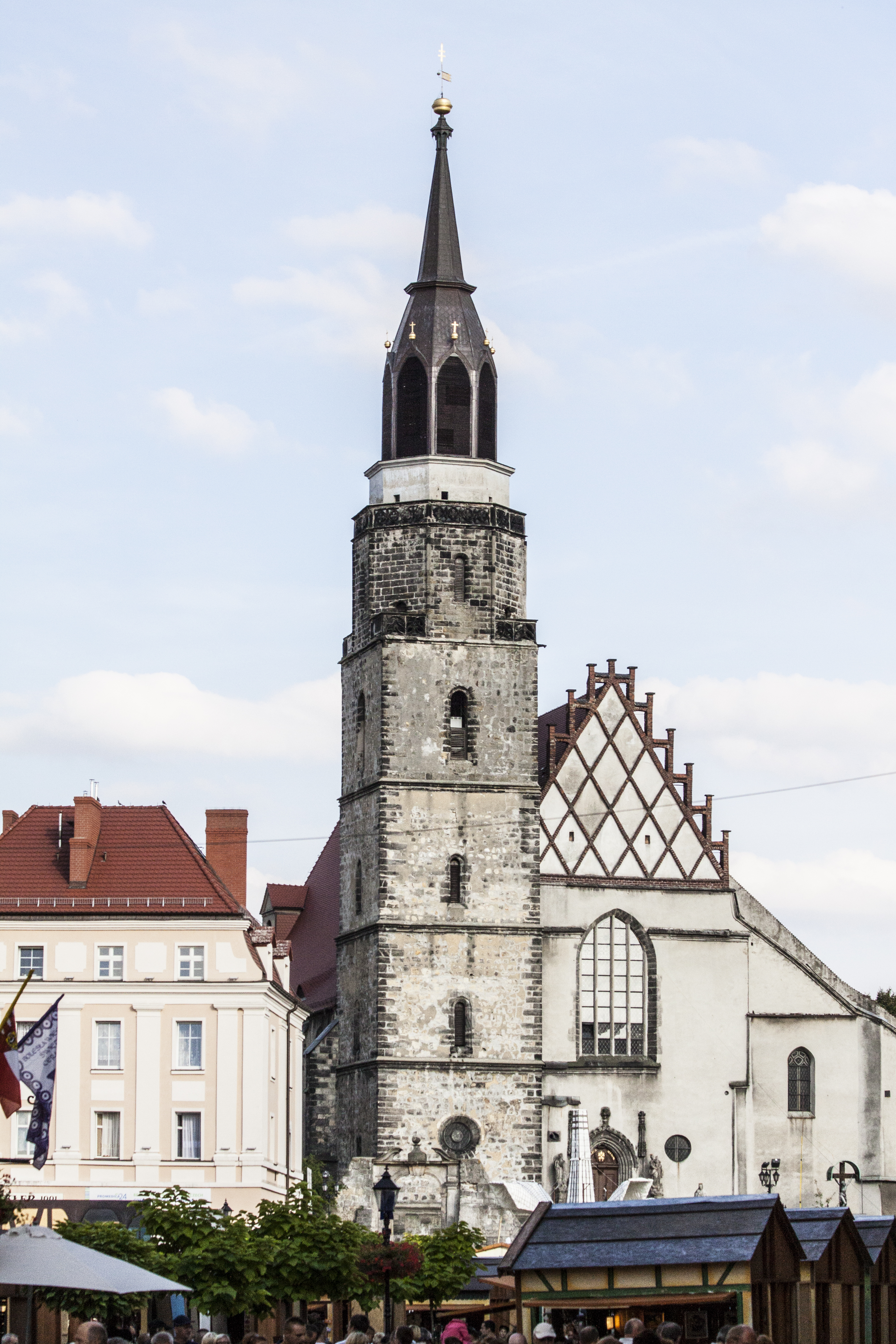 Bolesławiec, ul. Kościelna - Bazylika Wniebowzięcia NMP i św. Mikołaja, 2 poł. XV, XVI, 2 poł. XVII